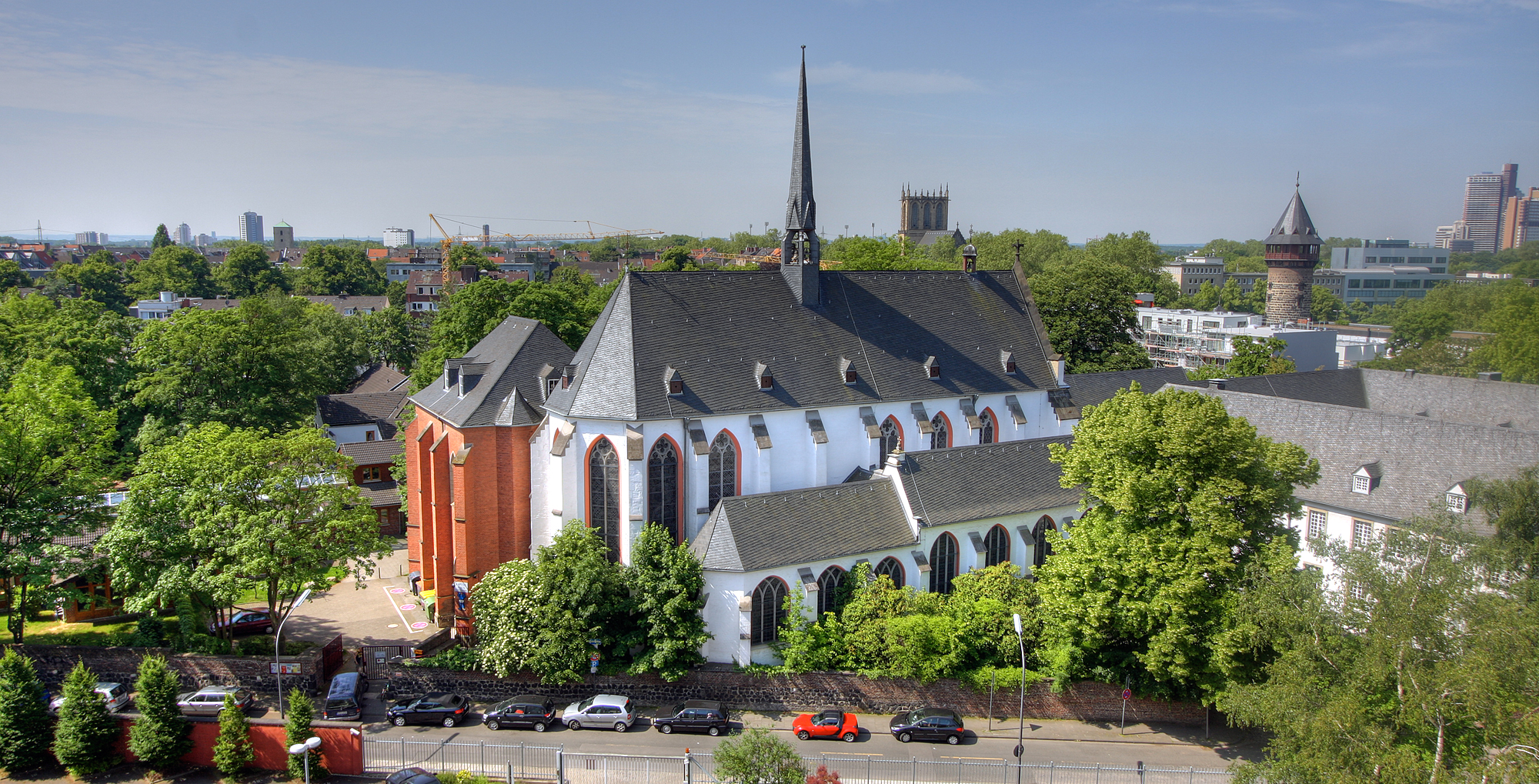 Anlage der Kölner Kartause mit Kirche und Kapitelhaus, rechts das Brüderhaus, vom Augustinerkrankenhaus aus Norden gesehen